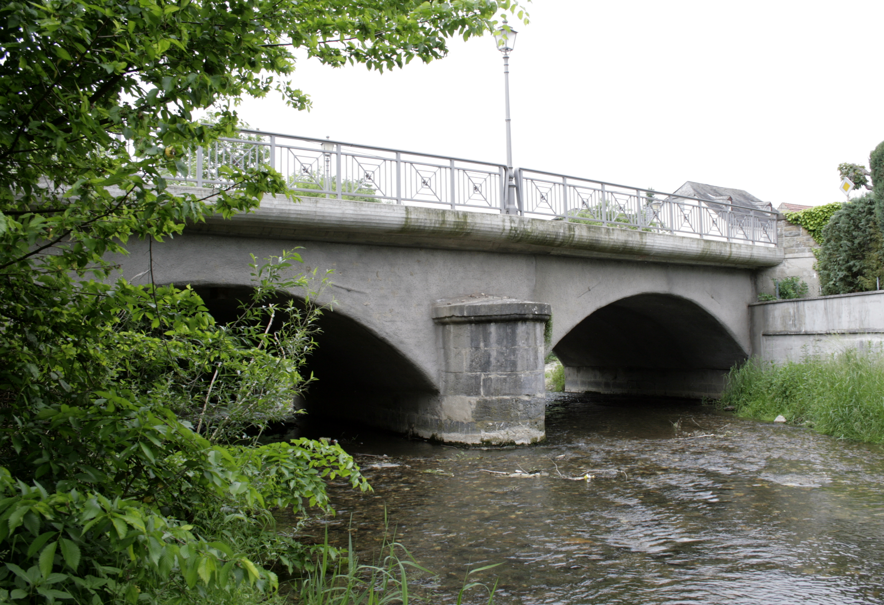 Brücke über den Emsbach in Niederselters, Deutschland